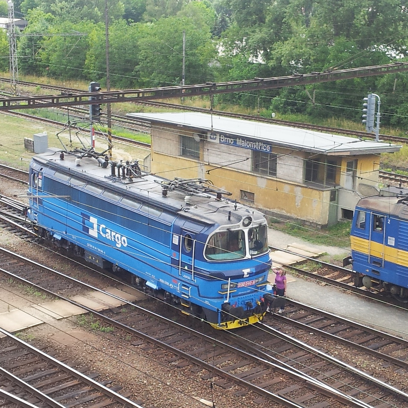 Lok 230 040 im Brno Malomerice, Juni 2015